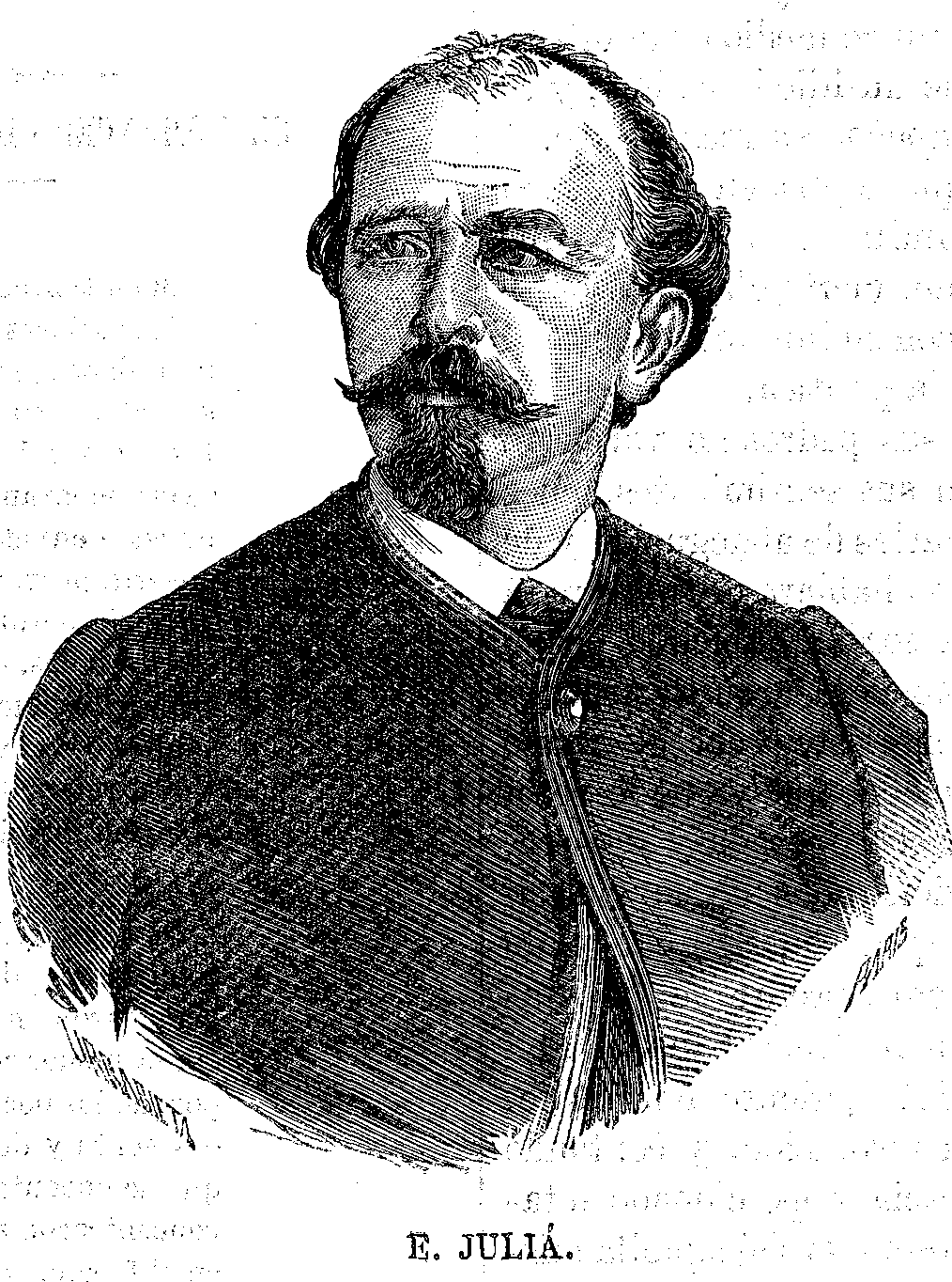 Eusebio Juliá. Grabado de Marcelo París por dibujo de Vicente Urrabieta. La Ilustración Popular, n.º 10, agosto de 1873